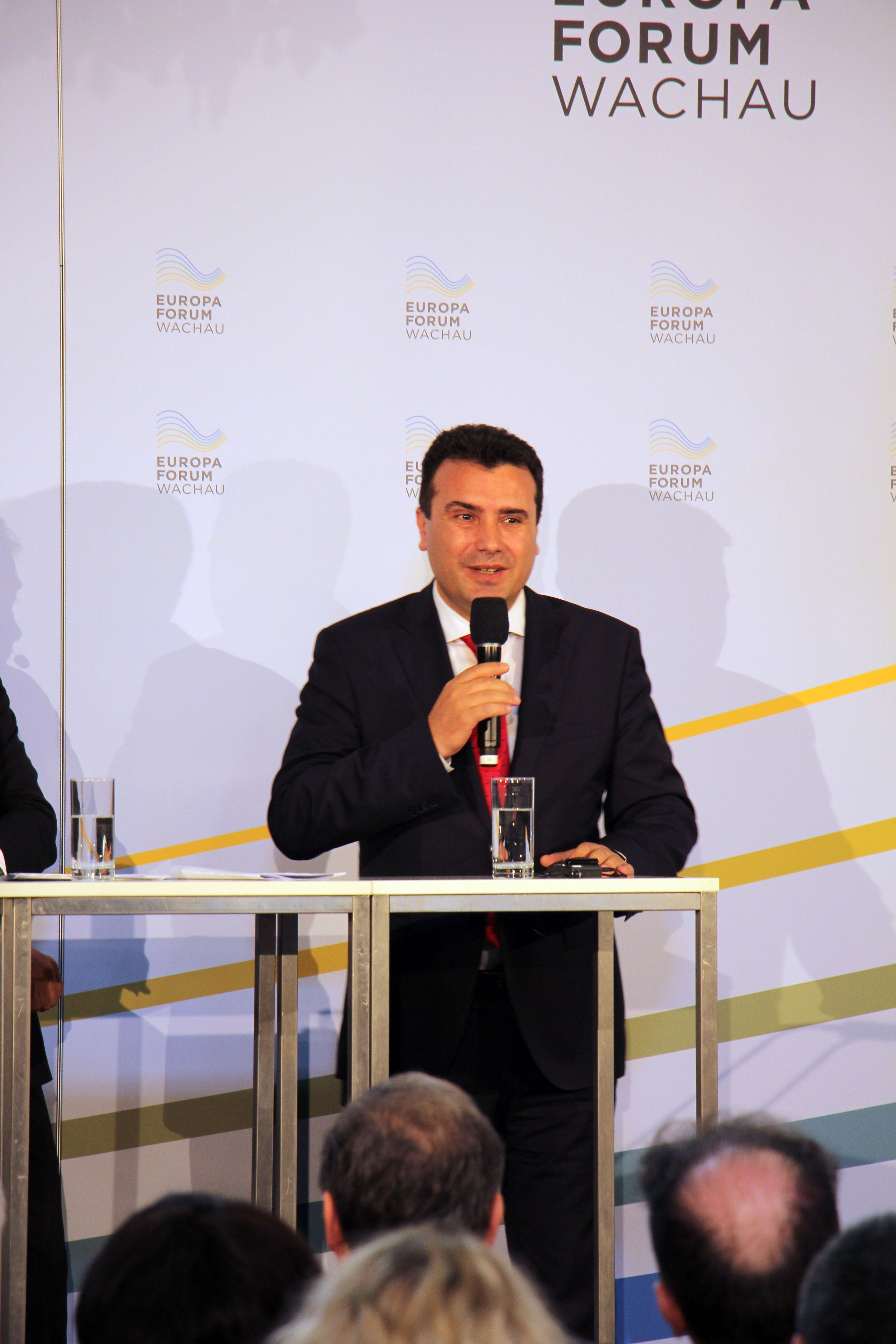 Europaforum Wachau 2019 auf Stift Göttweig